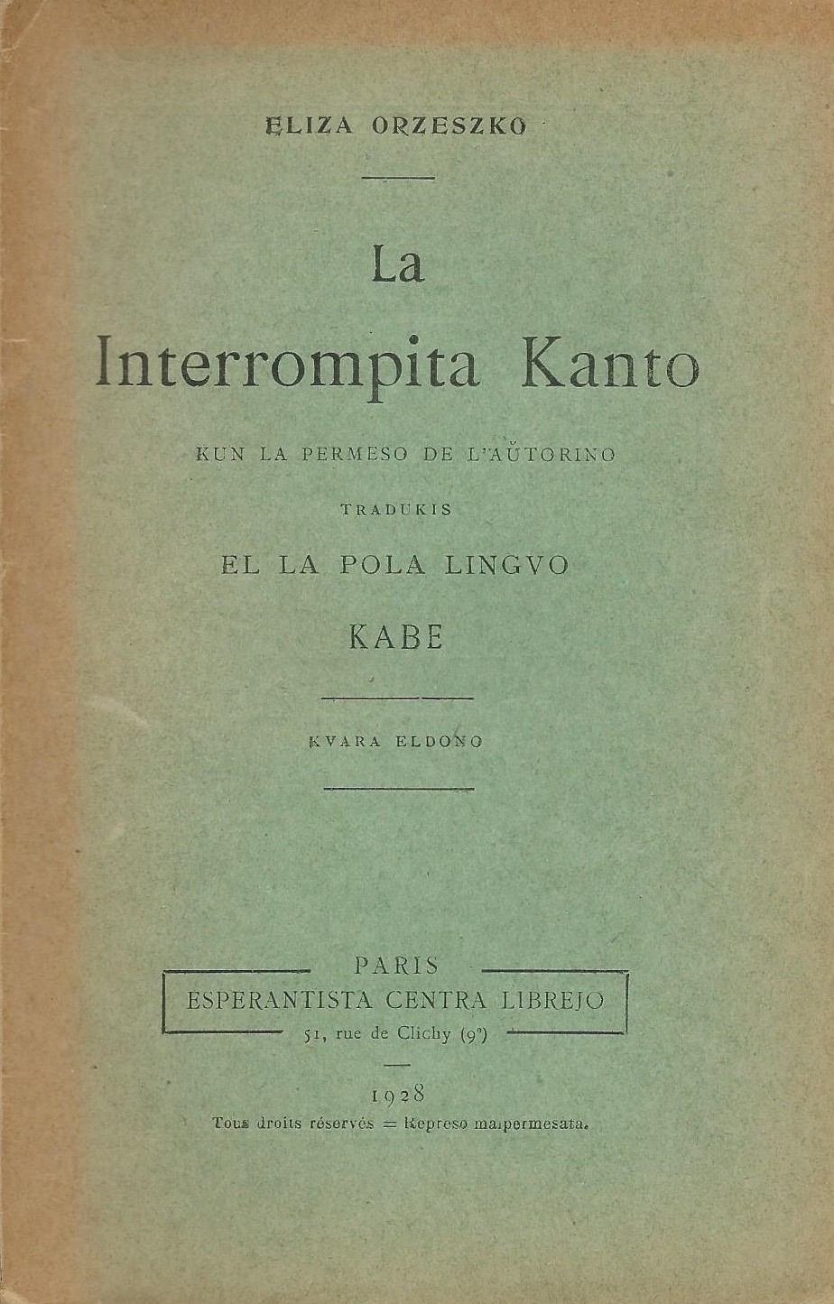 kovrilo de "La Interrompita Kanto", 1928